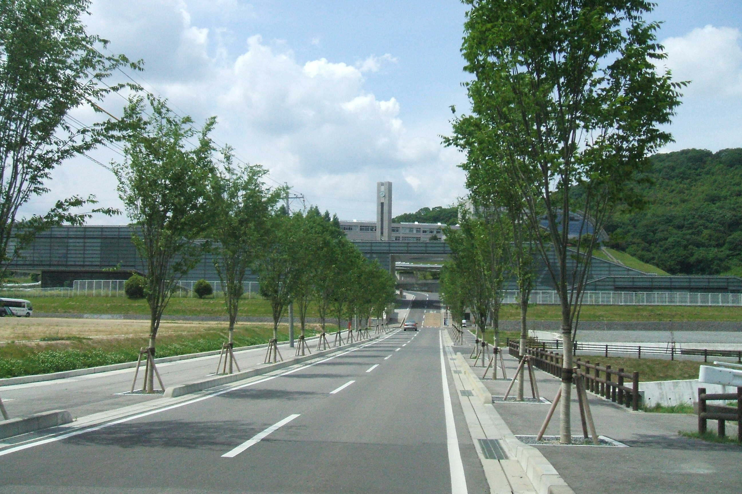 岡山県岡山市東区瀬戸町にある環太平洋大学第一キャンパスの遠景